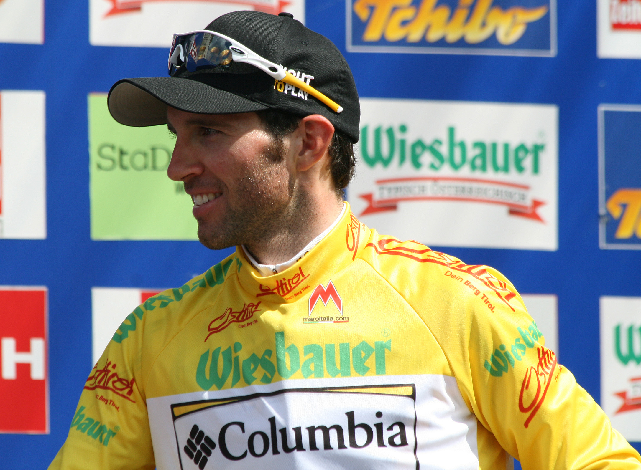 Österreich-Rundfahrt 2009: Gesamtsieger Michael Albasini